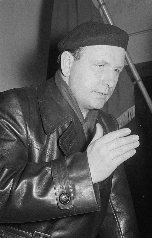 Original image description from the Deutsche FotothekPortrait des Schauspielers Günther Simon